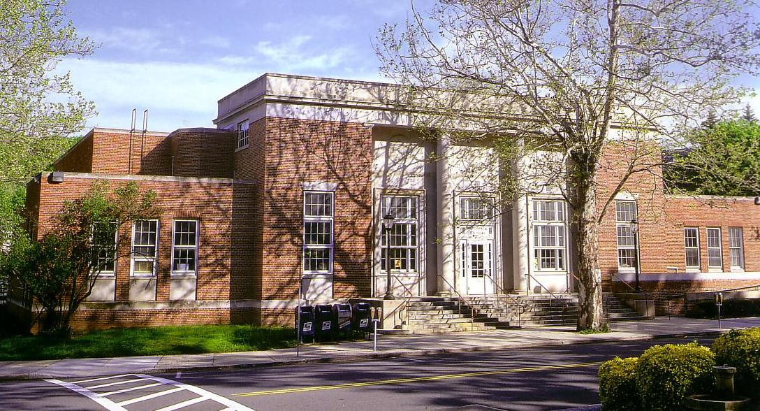 Scarsdale Post Office